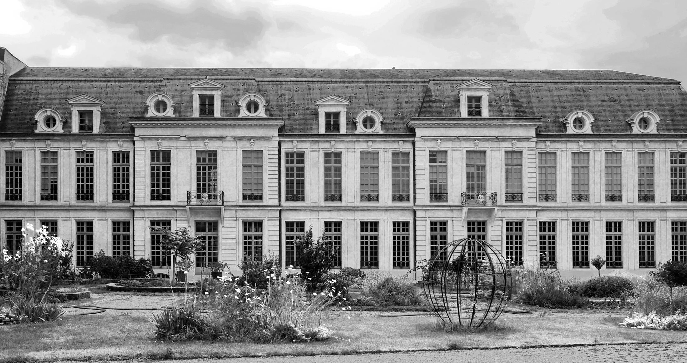 Hôtel d'Aumont (Classé) - Façade Sud - Paris IV .